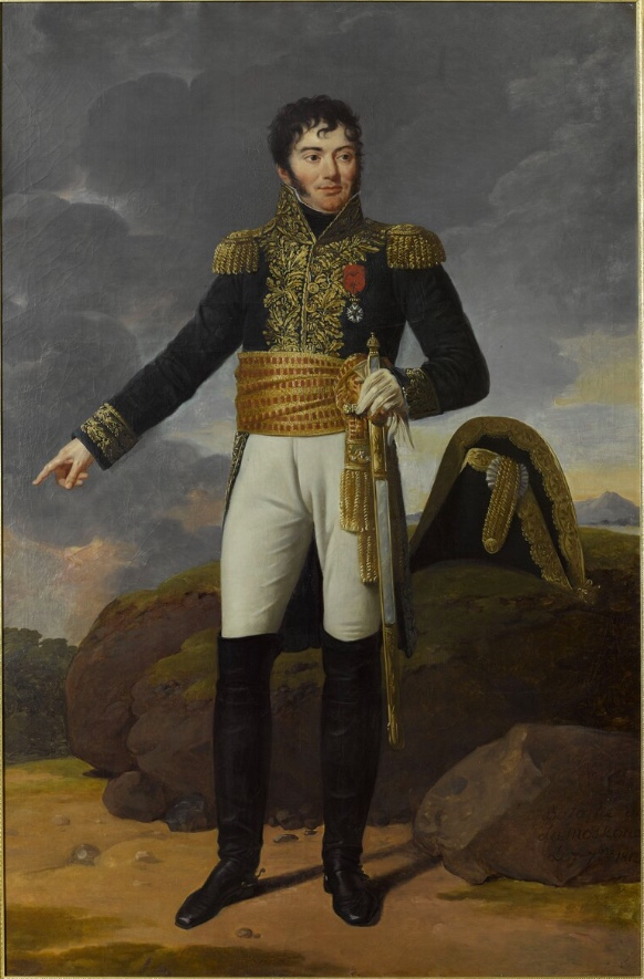 JEAN-VICTOR, BARON THARREAU, GENERAL DE DIVISION (1767-1812) portrait (Tharreau Jean Victor, général, homme, en pied, de trois-quarts, Ordre de la Légion d'honneur, uniforme, épée, chapeau Portrait of Tharreau, Jean Victor. General. Man. Standing, 3/4 quarter. Wearing Order of the Legion of Honor. Uniform. Sword. Hat.